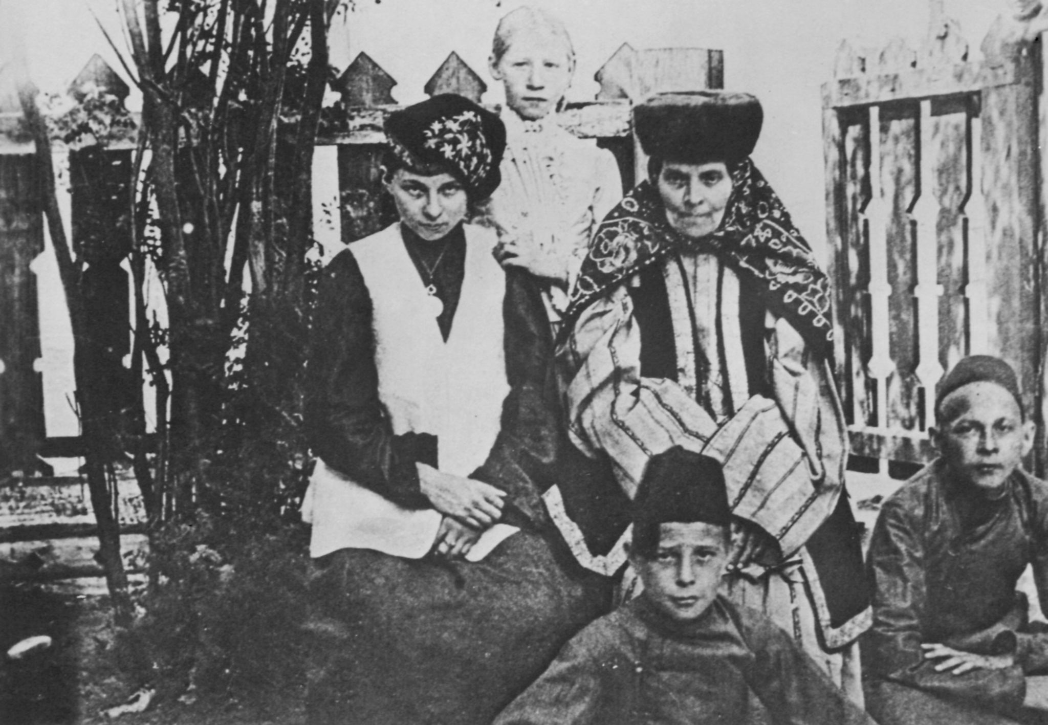 Russischer Photograph: Kasaner Tataren